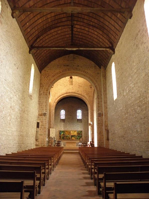 Nef de l'église Notre-Dame d'Ambrières-les-Vallées (53).